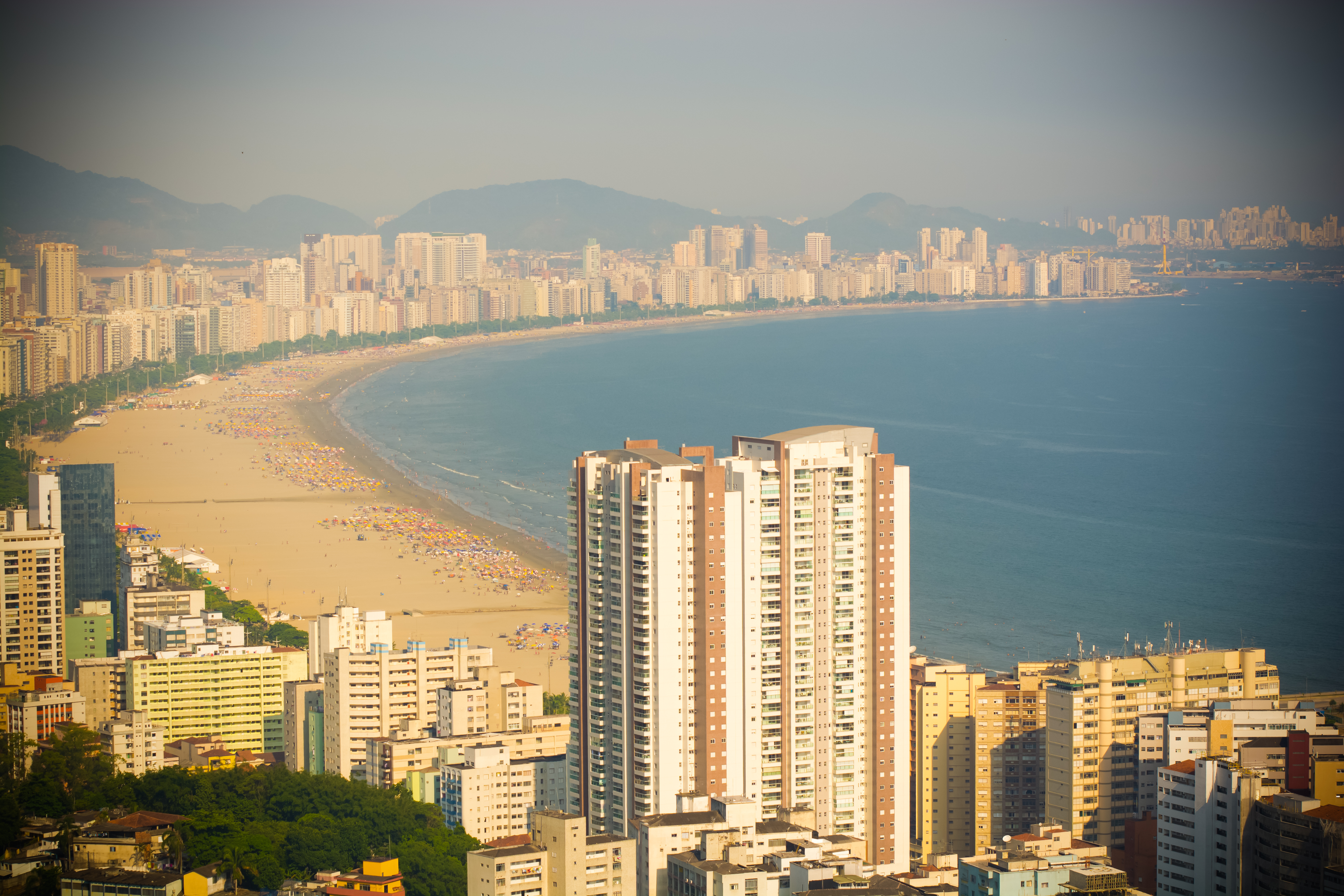 Bela orla Santista vista do morro do Itararé